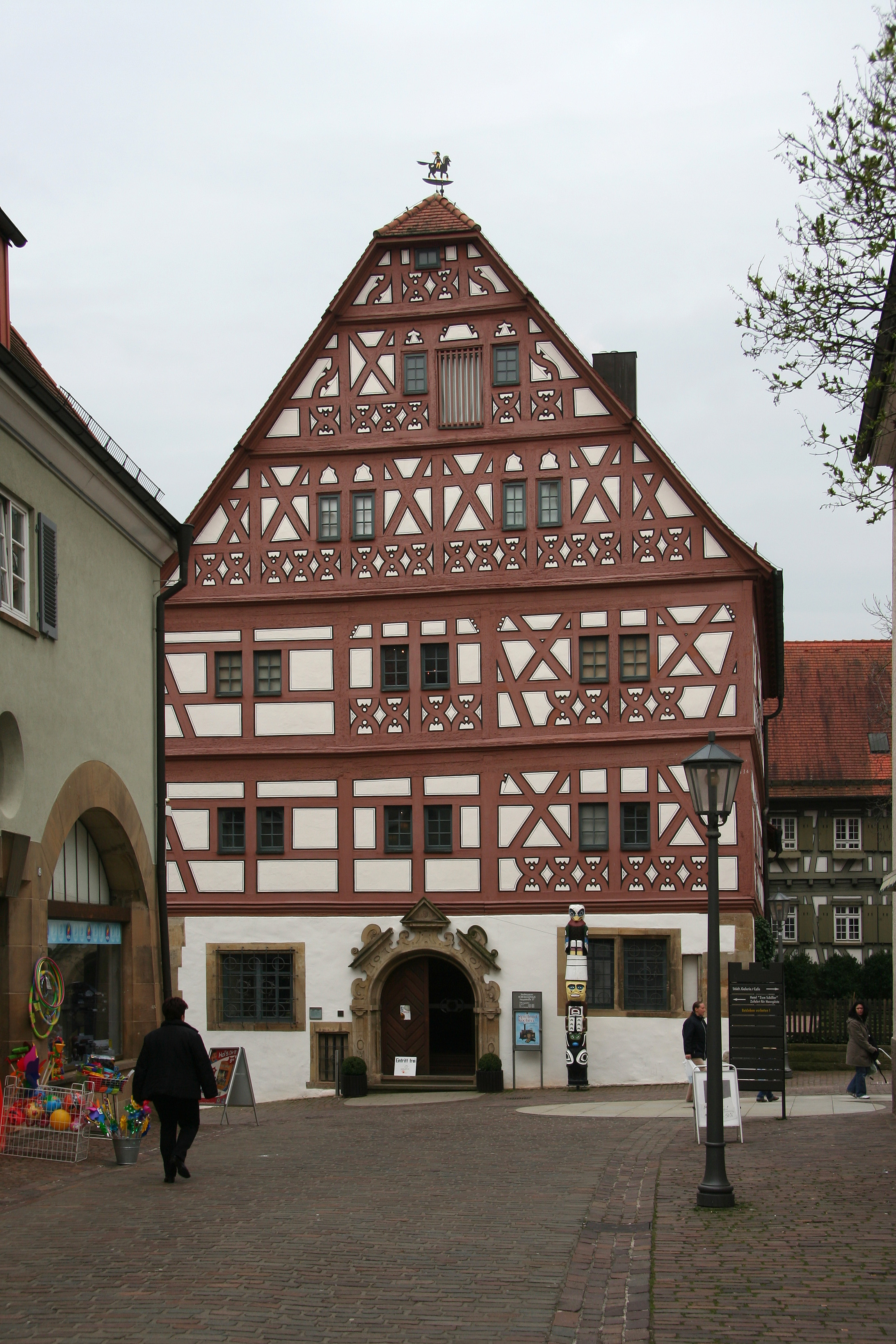 Giebel des Hornmoldhauses in Bietigheim